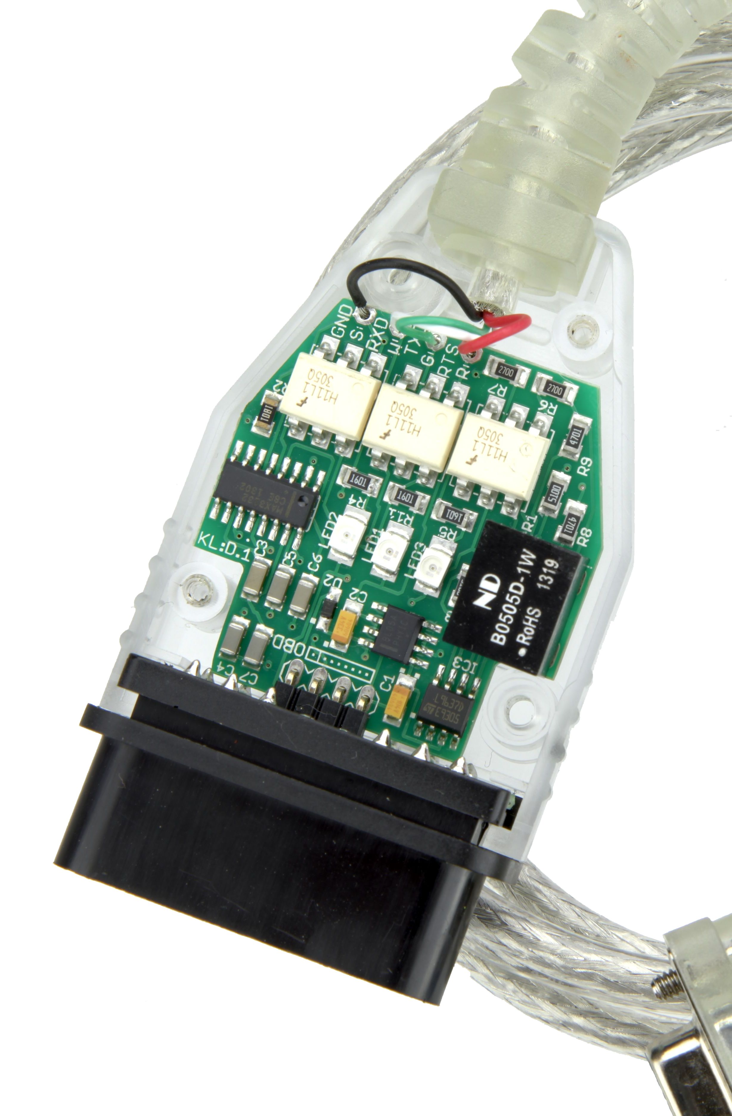 KL2321 Serielles KL Diagnoseinterface für Fahrzeugdiagnose OBD/OBD2 contributor